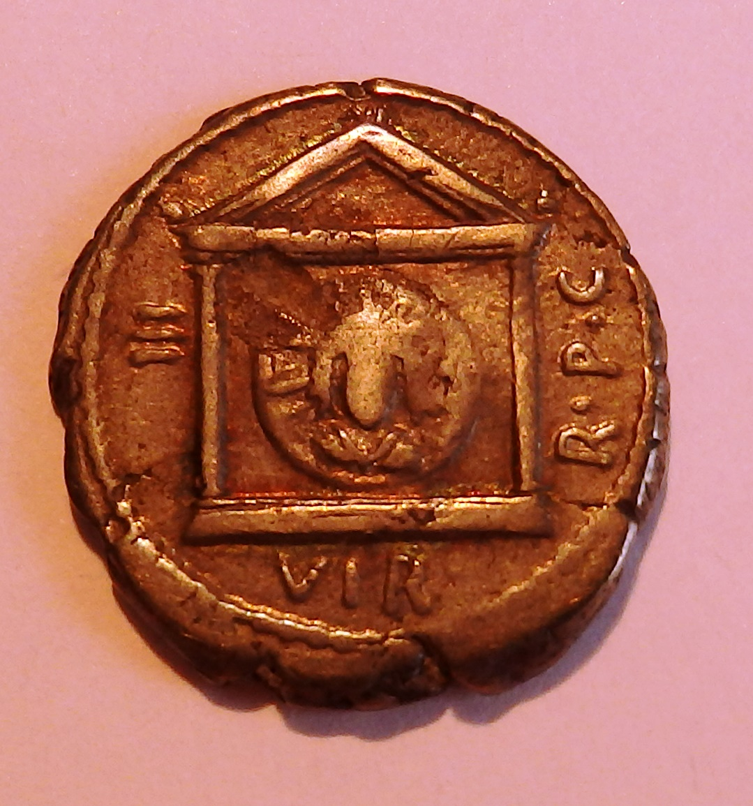 Schrein für Sol auf Denar des Markus Antonius', 42 v. Chr., Albert 1609